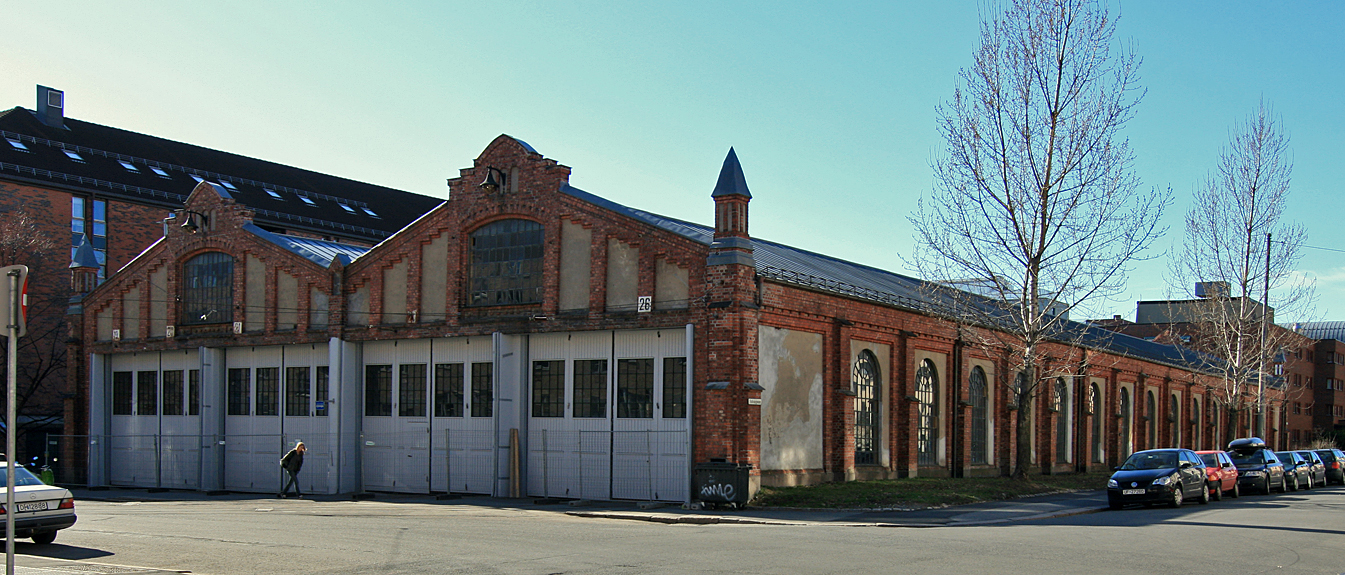 Sporveismuseet Vognhall 5, Majorstua, Oslo. Oppført for Christiania Elektriske Sporveisaktieselskab i 1913; arkitekt Paul Due.